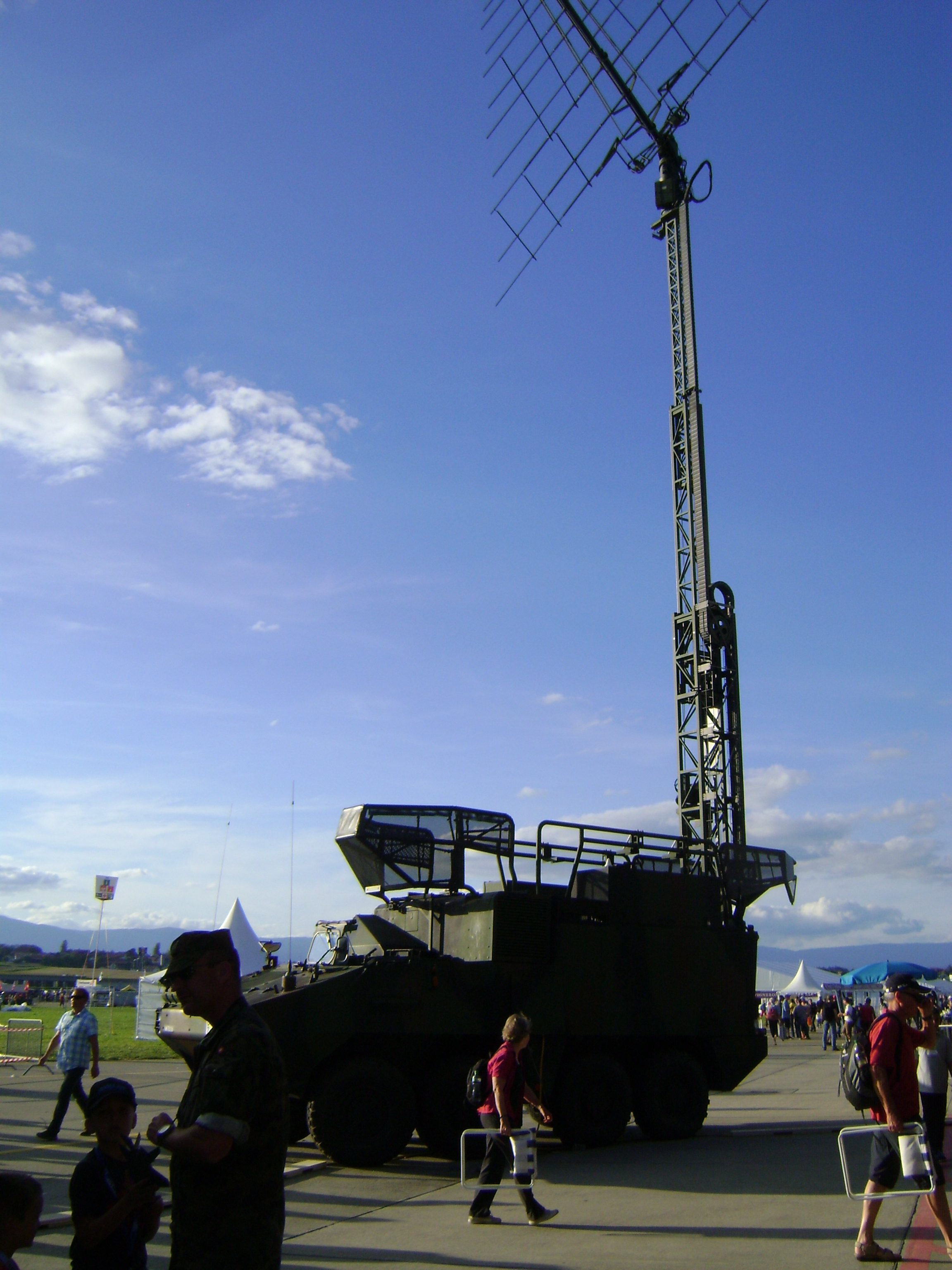 Funk Piranha